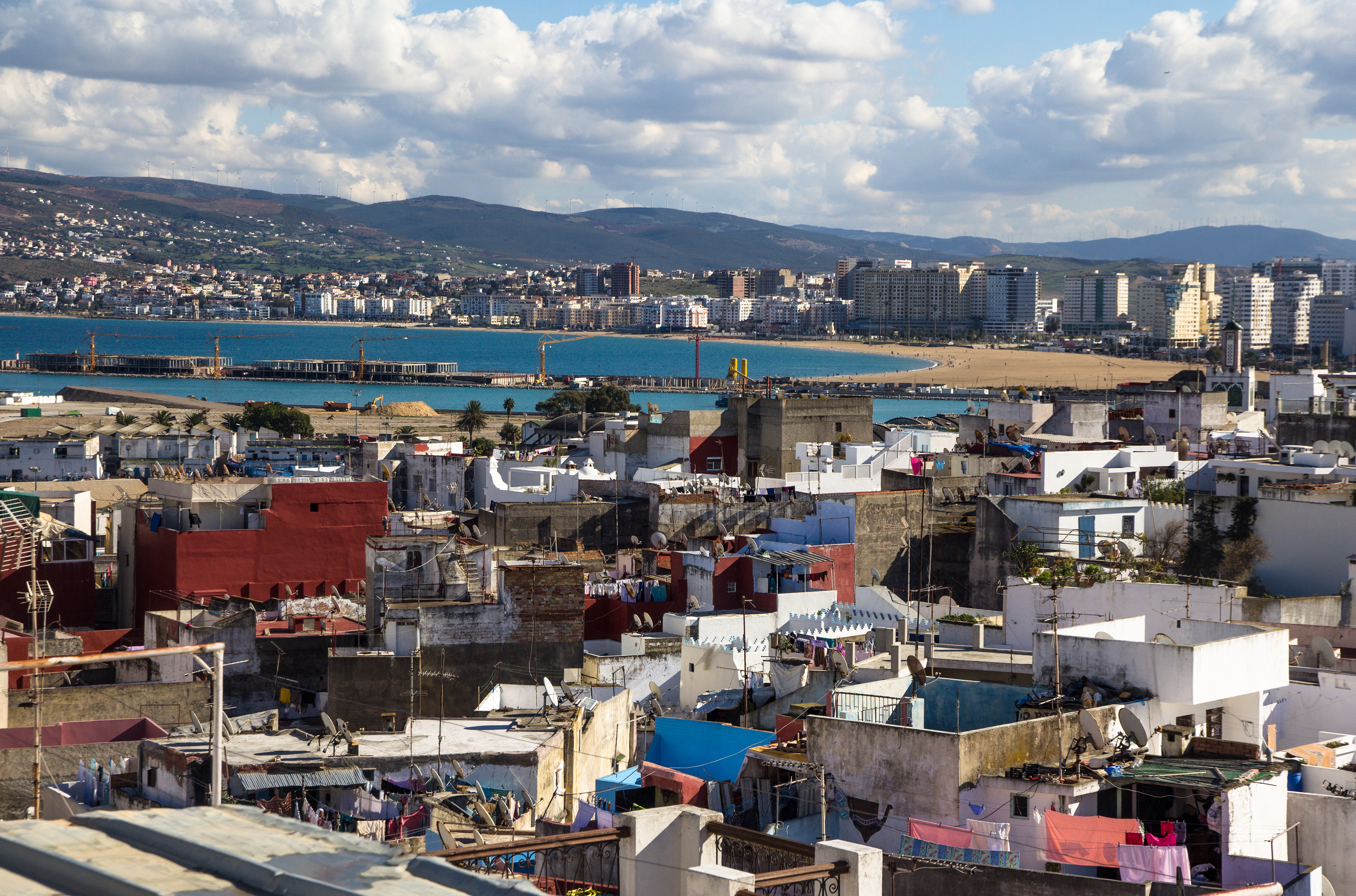 Tangier